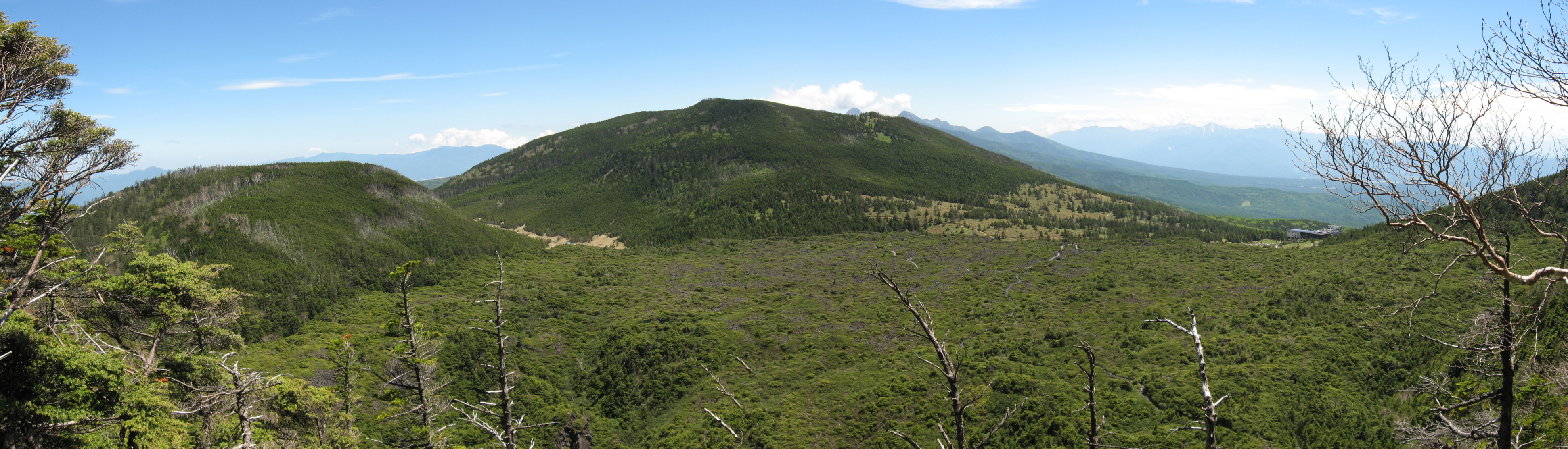 縞枯山と坪庭